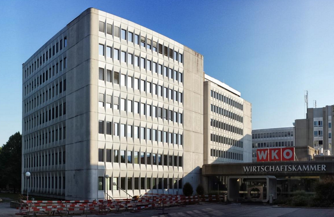 Wirtschaftskammer, WIFI Saalbau und Freundschaftsdenkmal Graz-Triest